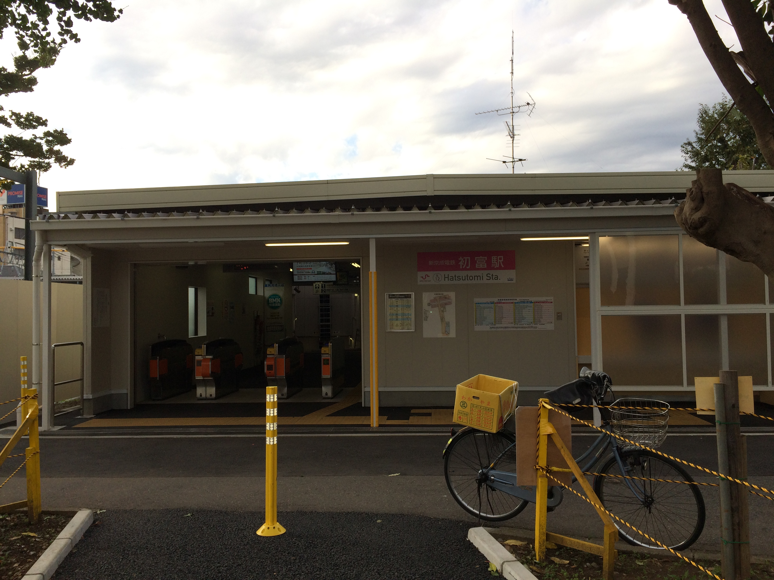 初富駅仮駅舎